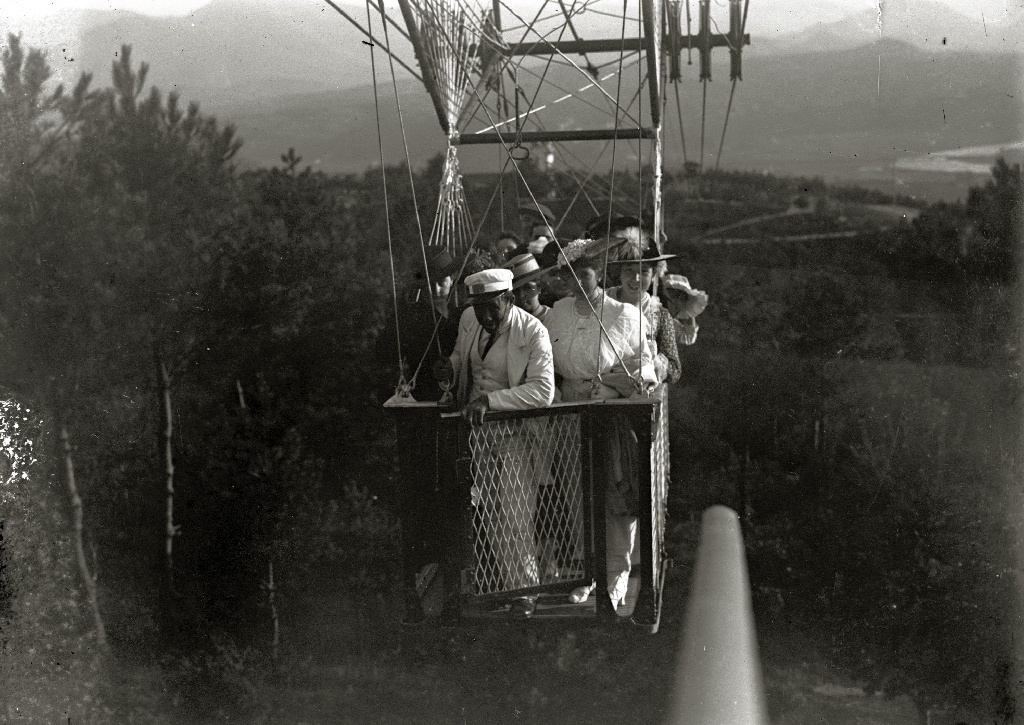 Título original: Grupo de personas en el Teleférico de Ulia (1/2) Localización: San Sebastián (Guipúzcoa)